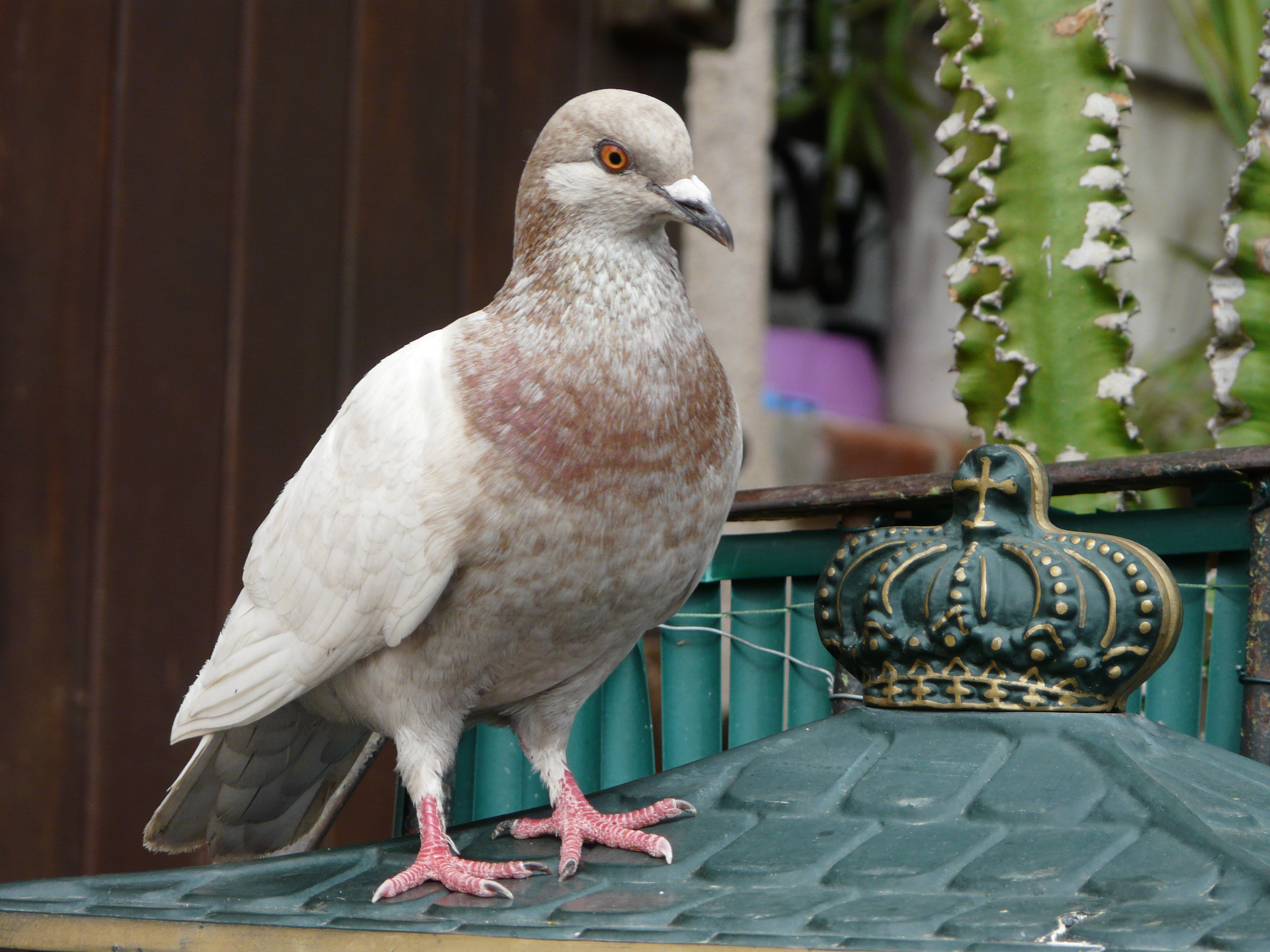 Columba livia